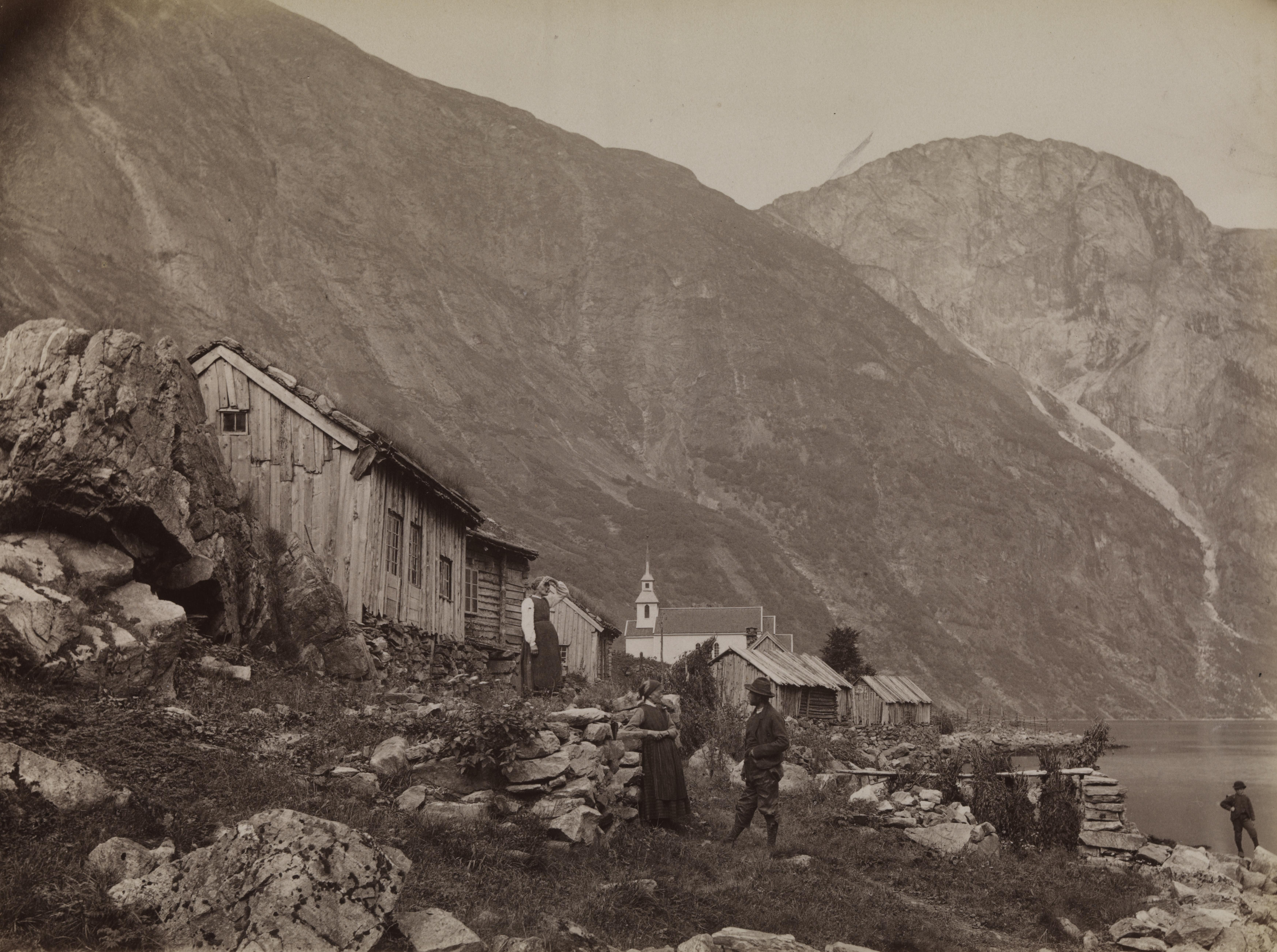 Sted: Nærøyfjorden Kommune: Aurland Fylke: Sogn og Fjordane Tagger: kirker landskapsfotografi